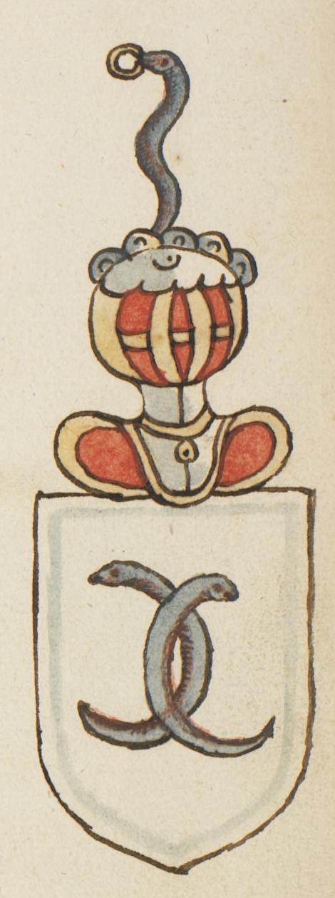 Illustrasjon hentet fra et privatarkiv i Nasjonalbiblioteket med tittelen "Insignia quædam virorum illustrium in Norvegia quodam habitantium" av Iver Nielssøn Hirtzholm.